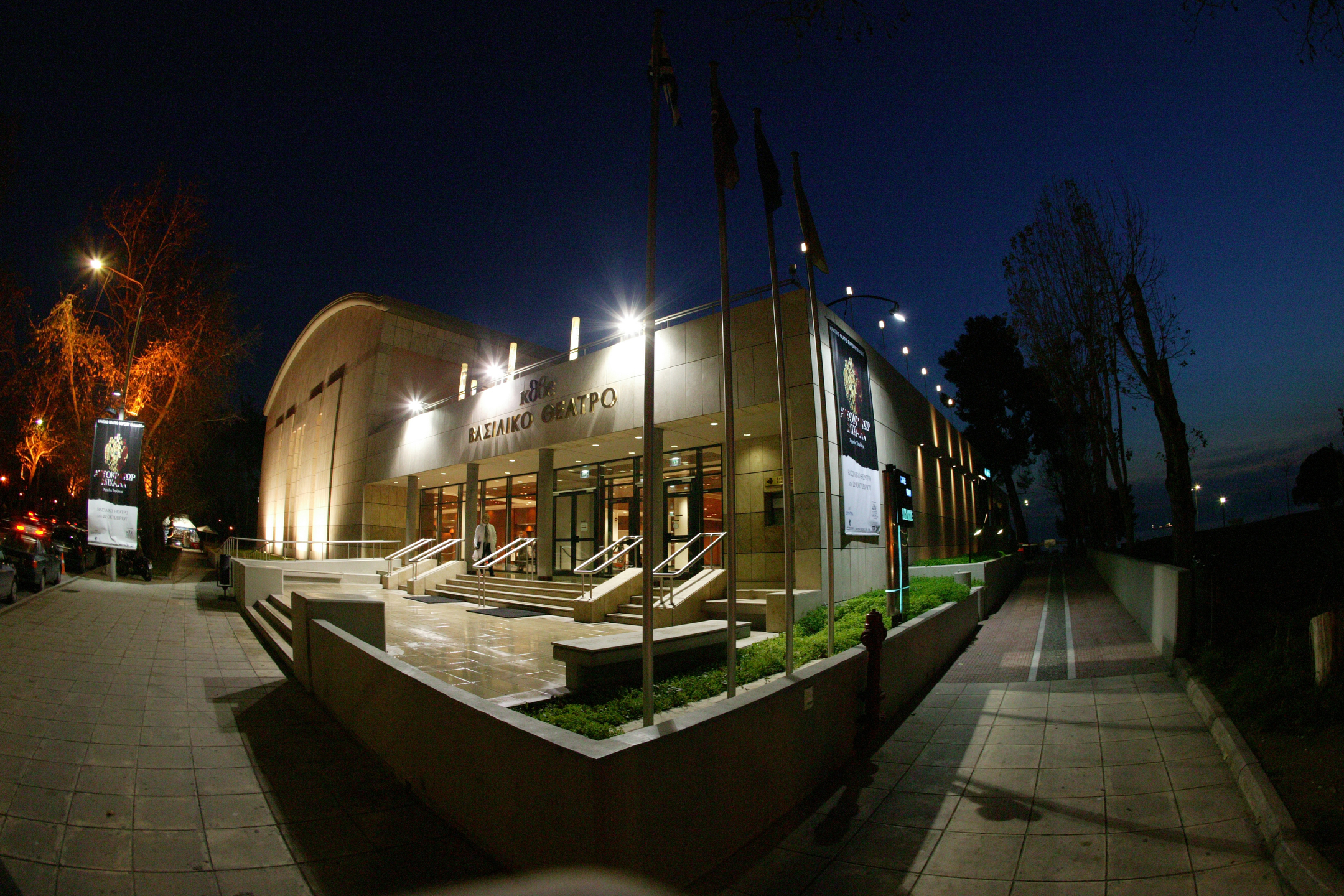 Η εξωτερική όψη του Βασιλικού Θεάτρου Θεσσαλονίκης.